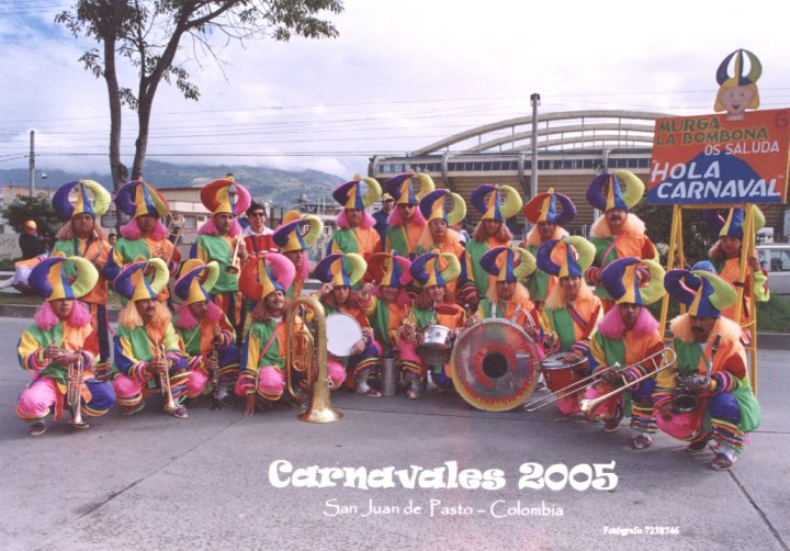 Murga la Bomboná, Carnavales 2005